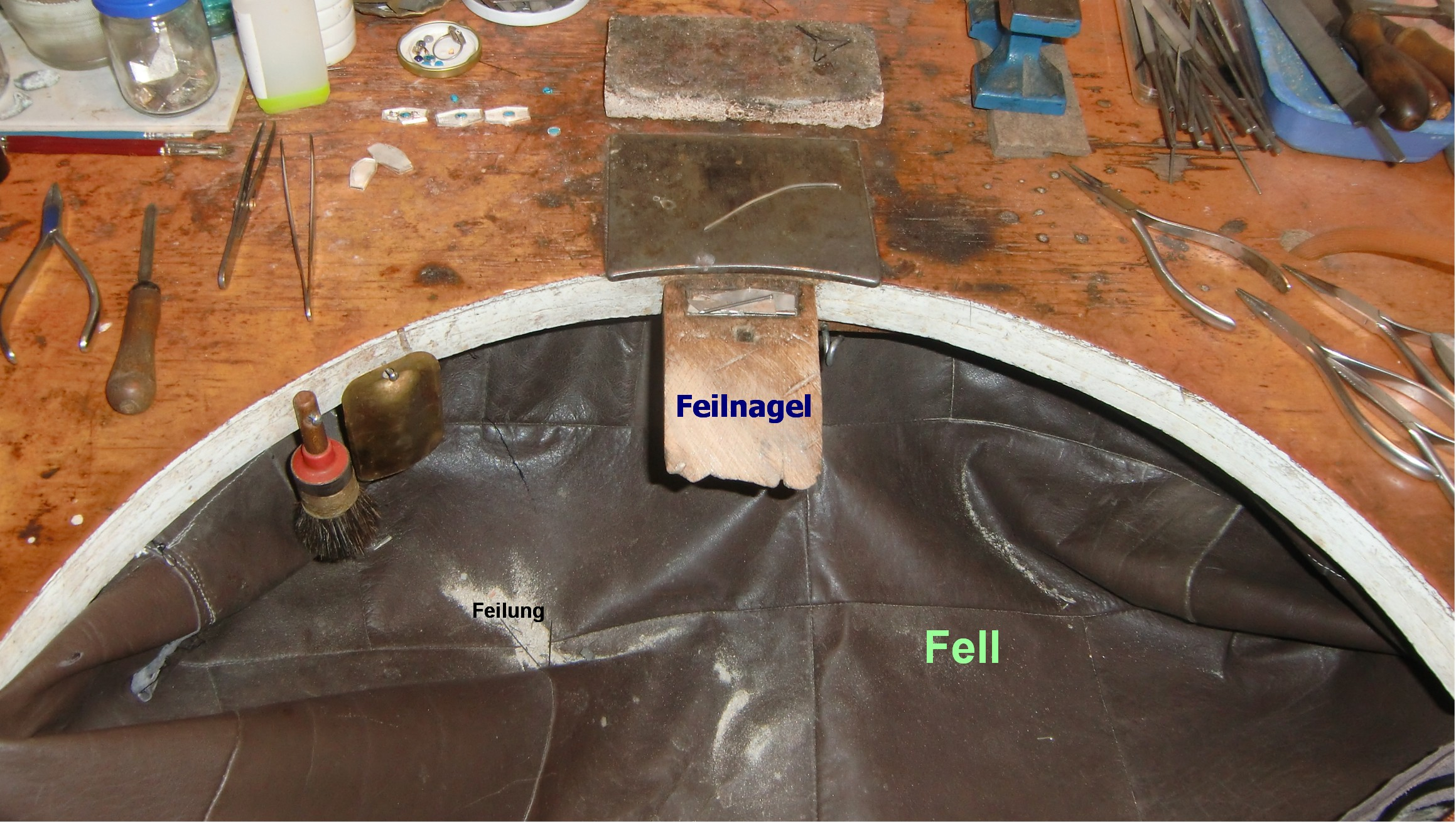 Werkbrett des Goldschmieds